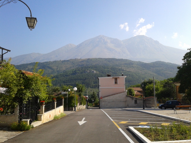 Il monte Velino visto da Magliano dei Marsi